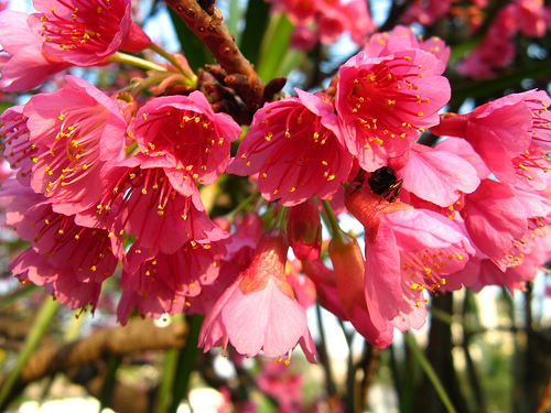 prunus campanulata sao paulo brasil